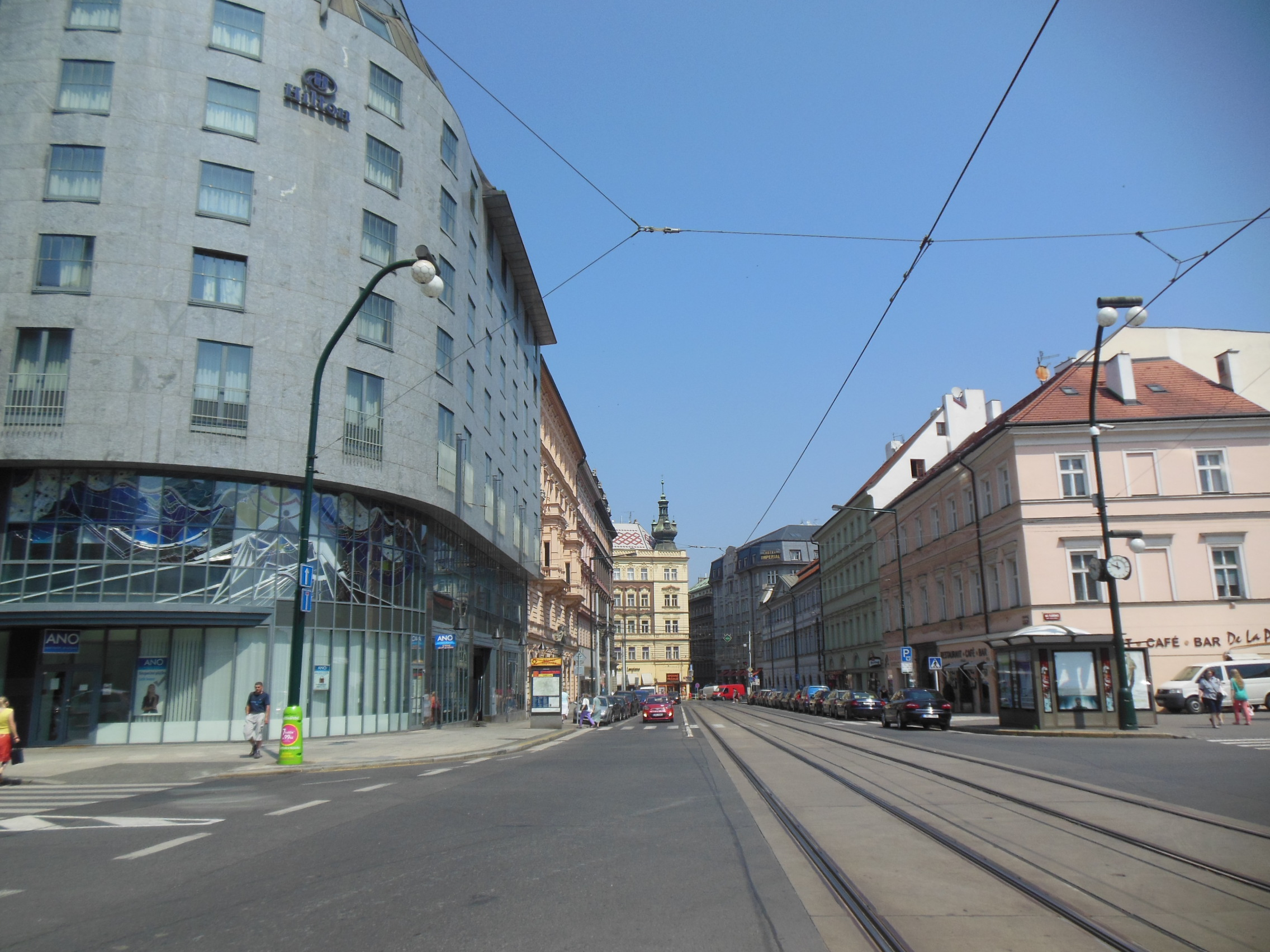 Ulice Havlíčkova na Novém Městě v Praze.